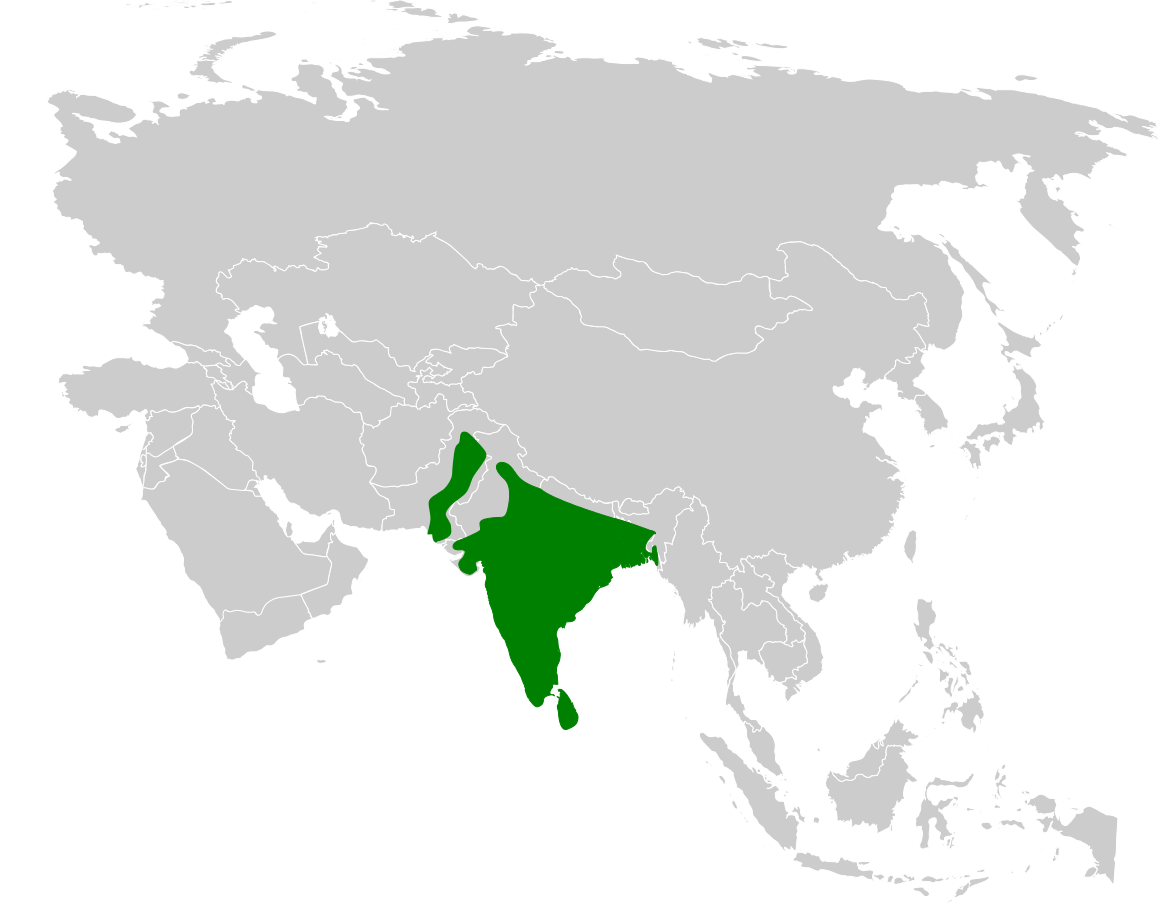 Eremopterix griseus distribution map based on